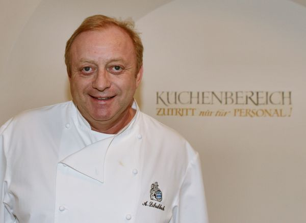 Alfons Schuhbeck